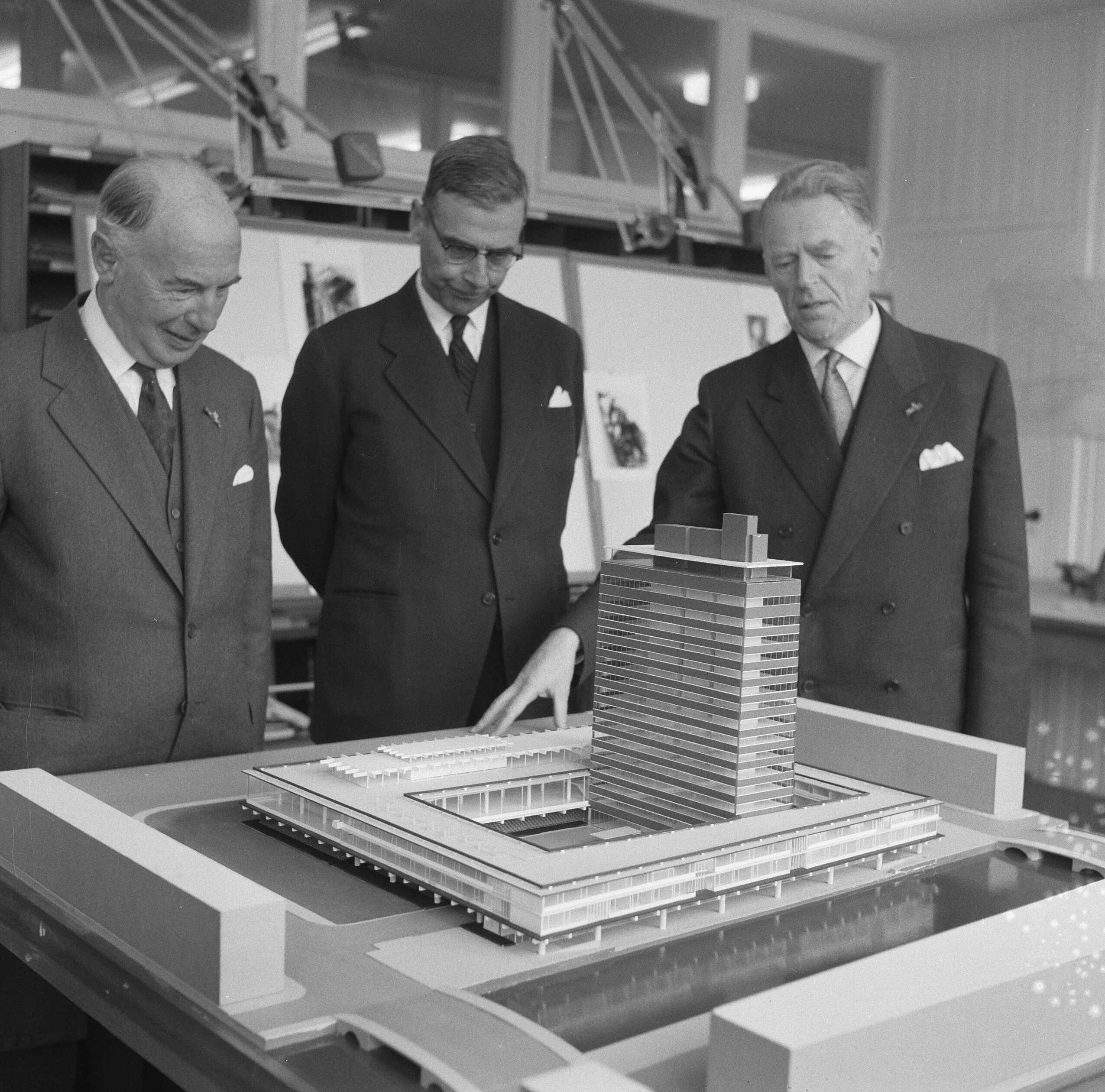 Collectie / Archief : Fotocollectie Anefo Reportage / Serie : [ onbekend ] Beschrijving : Burgemeester van Hall heit nieuwe paal voor Nederlandse Bank. Bekijken van de maquette Datum : 6 november 1961 Locatie : Amsterdam, Noord-Holland Trefwoorden : bouwnijverheid, burgemeesters Persoonsnaam : Hall, Gijs van Fotograaf : Nijs, Jac. de / Anefo Auteursrechthebbende : Nationaal Archief Materiaalsoort : Negatief (zwart/wit) Nummer archiefinventaris : bekijk toegang 2.24.01.03 Bestanddeelnummer : 913-1411 Reacties Geplaatst door Maaike op 07 januari 2013 - 01:32. Burgemeester Van Hall heit eerste paal van de in totaal 2500 voor de bouw van het nieuwe hoofdkantoor van de Nederlandse Bank aan het Frederiksplein. Bekijken van de maquette.